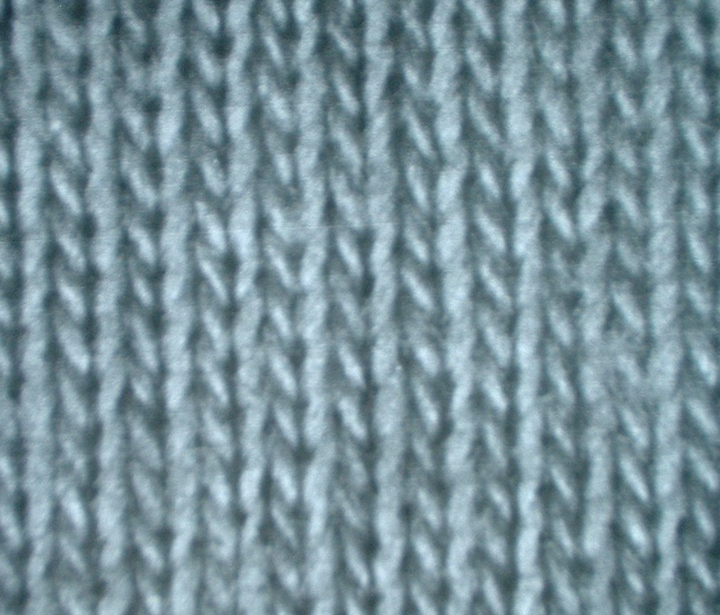 Glatte RL-Bindubg im Gestrick (rechte Seite)